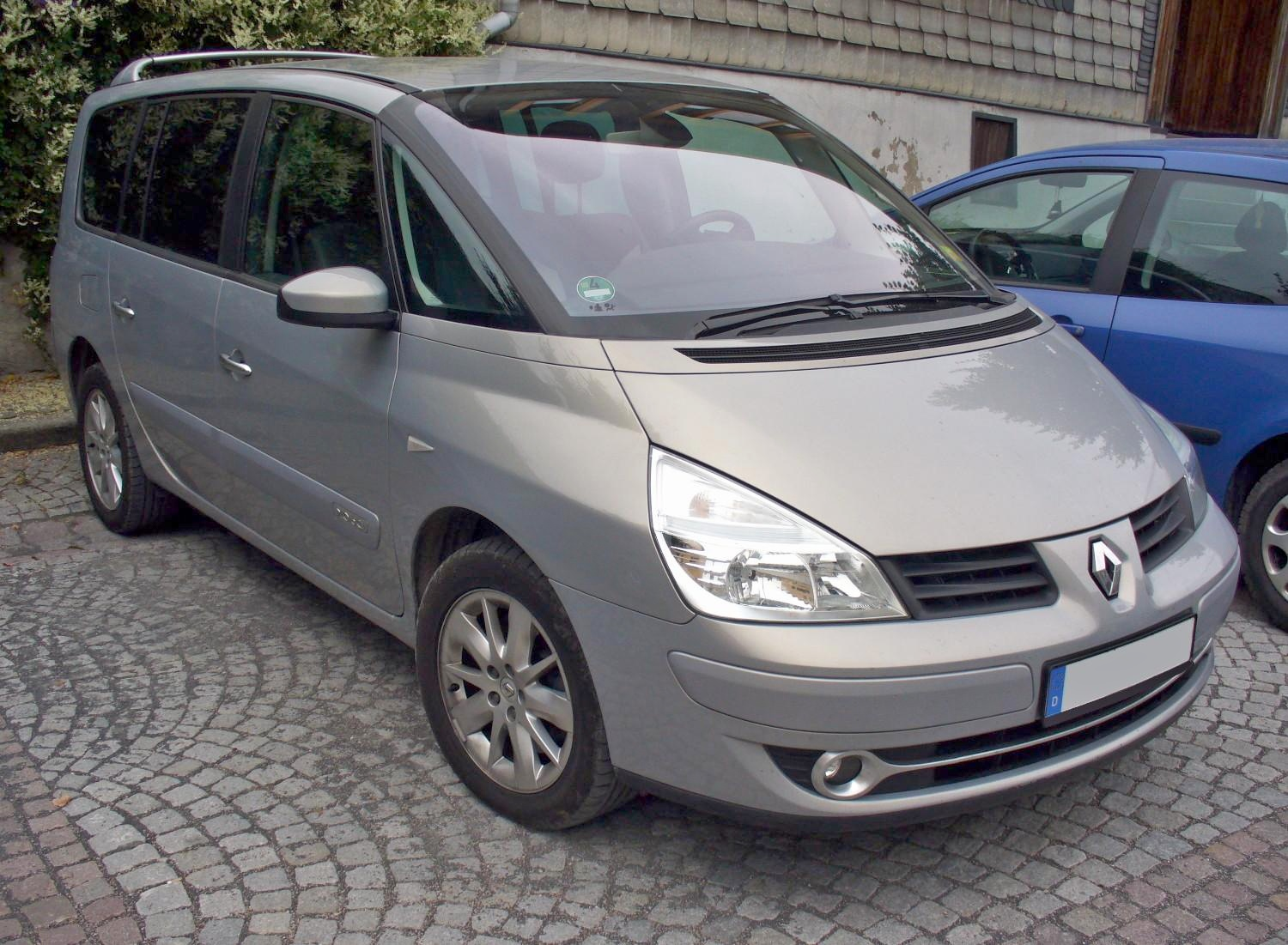 Renault Espace IV Phase II